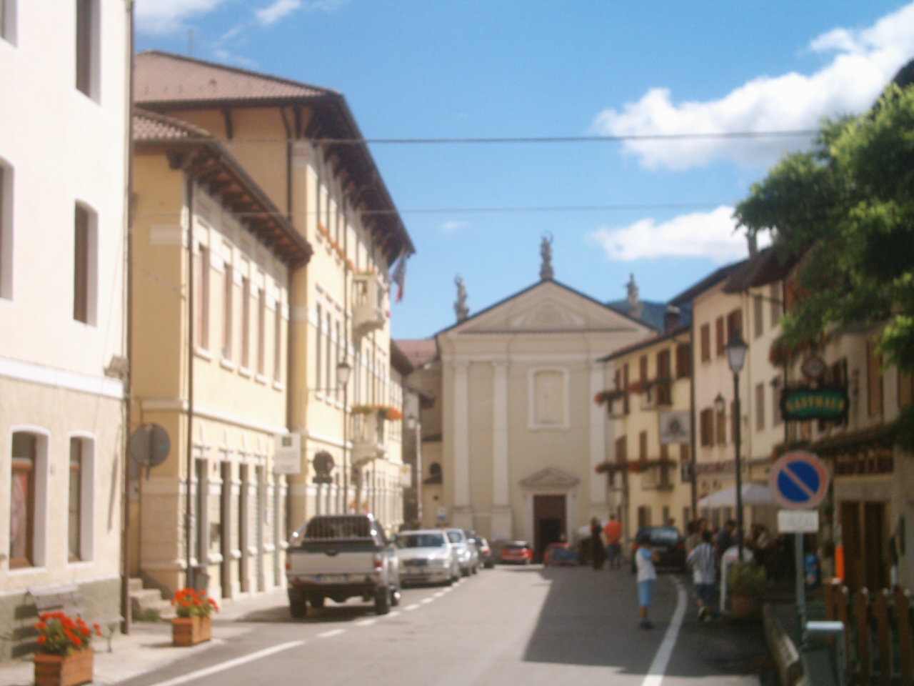 Posina, via Sareo